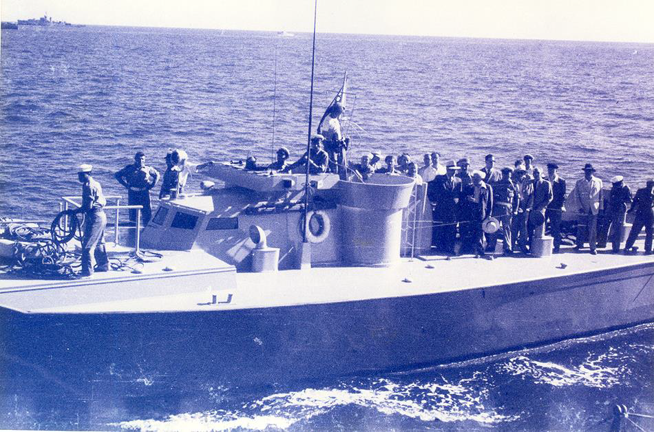 ראש הממשלה ושר הביטחון דוד בן גוריון על סיפון טרפדת אח"י נץ